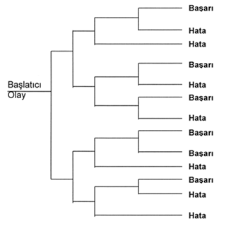 Bernoulli Metodu Olay Ağacı Analizi